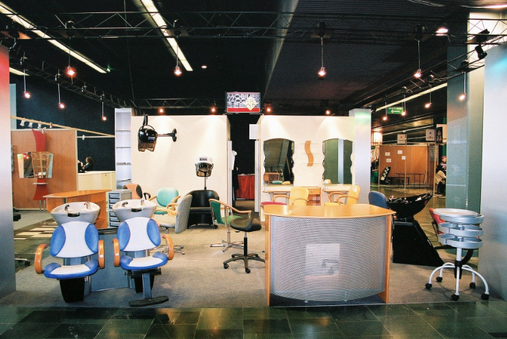 Stand Jacques Seban - Mondial de la Coiffure - Année 2000